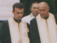 preotii lesenilor in 2006 (foto Oblio)